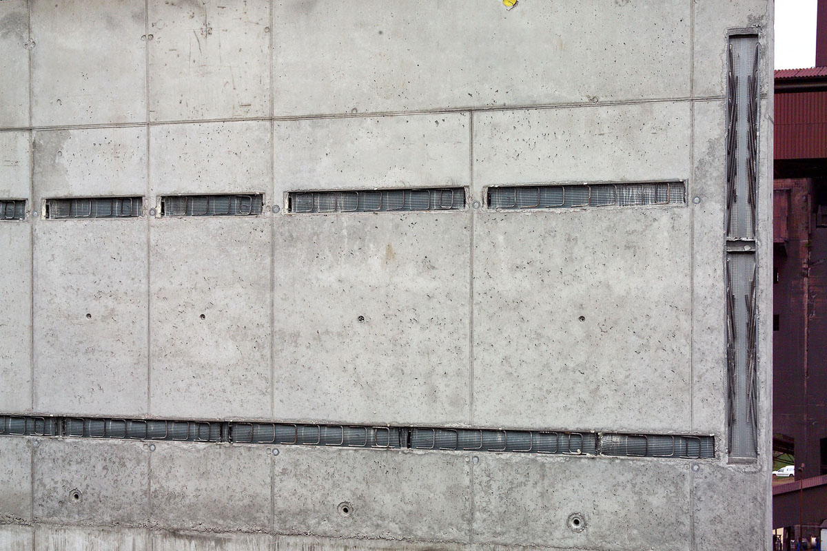 Einbetonierte COMAX Rückbiegeanschlüsse für die Verbindung zu einer Wand (senkrecht) und zwei Bodenplatten (wagerecht).